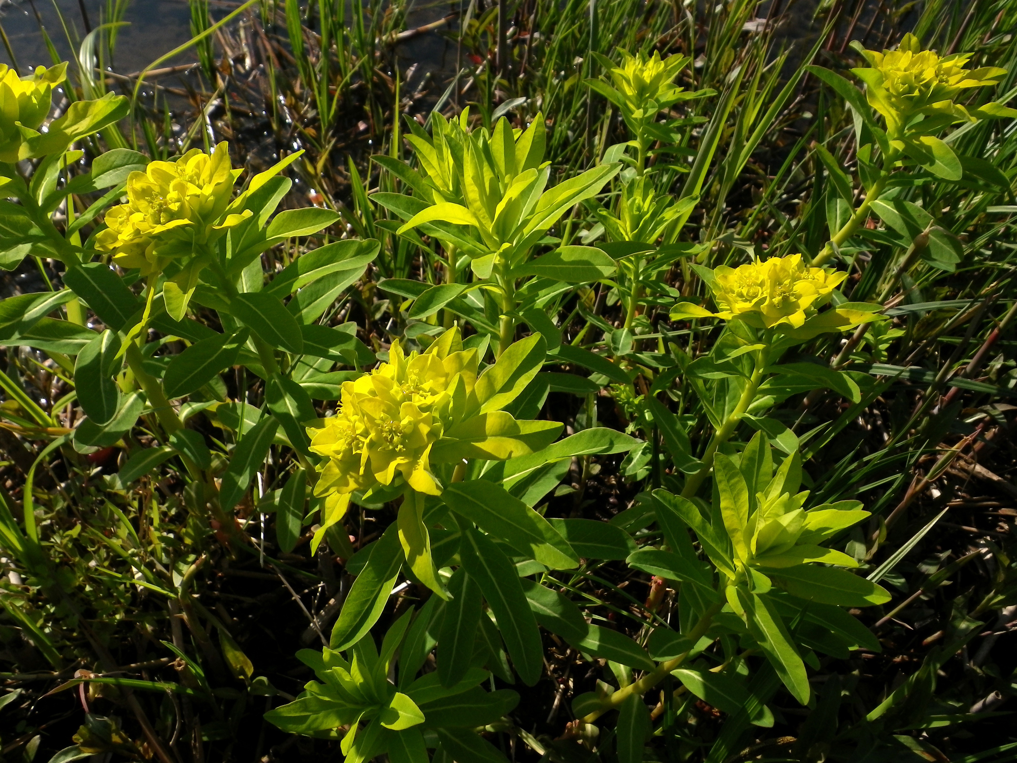 ノウルシ（静岡県富士市 浮島ヶ原自然公園で撮影）